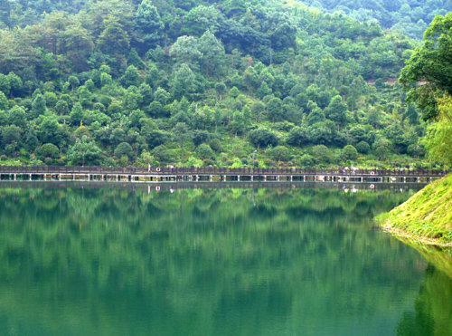 梅溪湖桃花岭